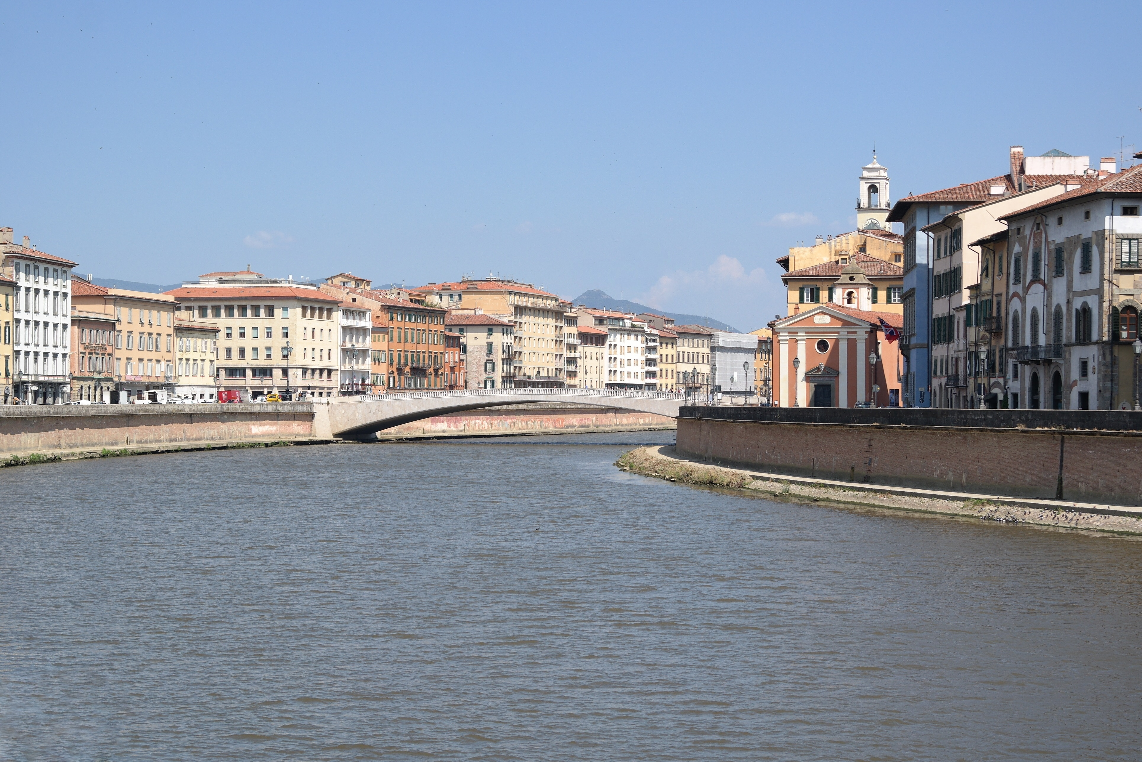 Arno con ponte di Mezzo sullo sfondo